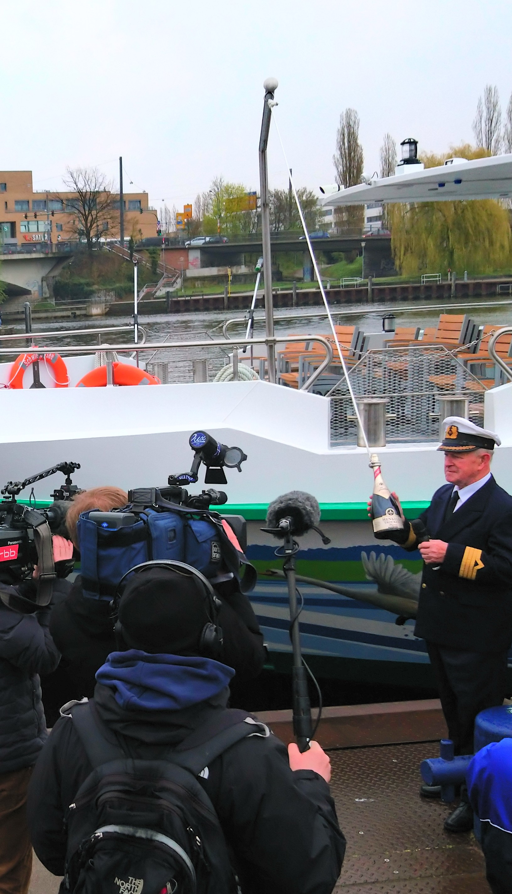 Das Fahrgastschiff Schwielowsee ist ein Schiffsneubau des Traditionsunternehmens Weiße Flotte Potsdam in der brandenburgischen Landeshauptstadt Potsdam. Die Schiffstaufe erfolgte am 14. April 2019 zur Eröffnung der alljährich seit 1959 stattfinden Flottenparade in Potsdam durch Altkapitän Heinz Ahlgrimm aus Ferch.